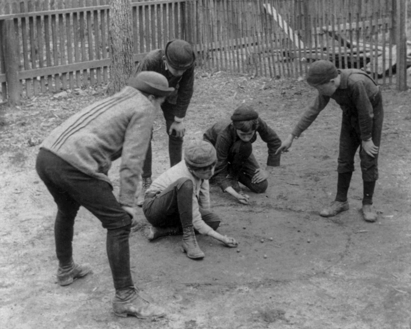 Boys playing marbles.